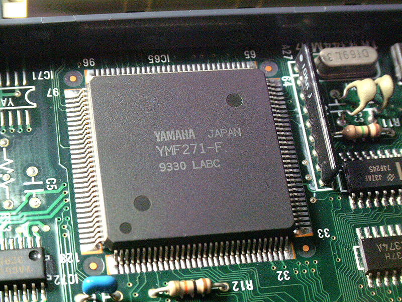 2006/08/20 Baz1521 撮影